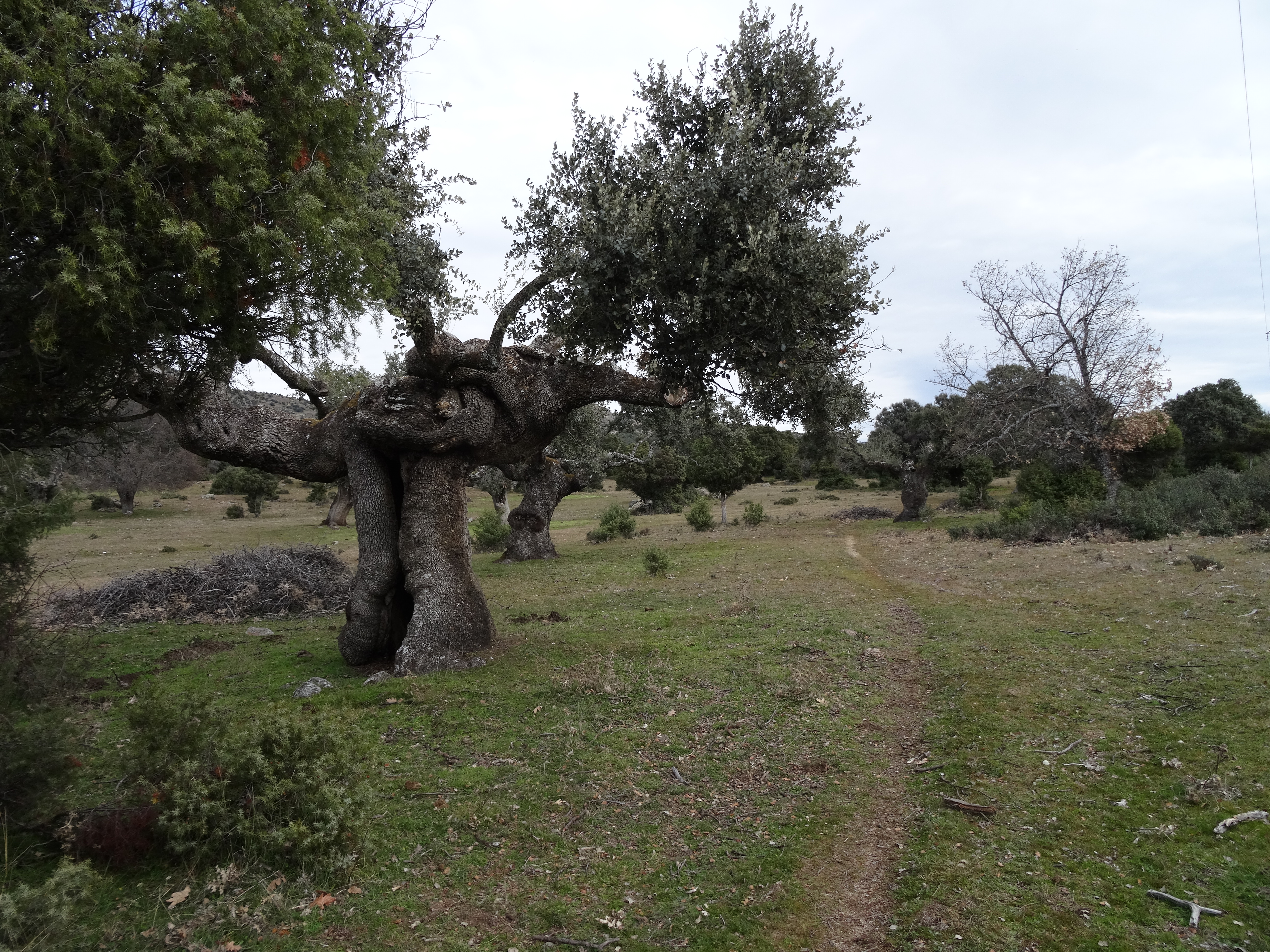 Dehesa de Navalsauz